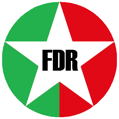 Logotipo de Frente Democrático Revolucionario - Nueva Alternativa, coalición política boliviana de las elecciones de 1980